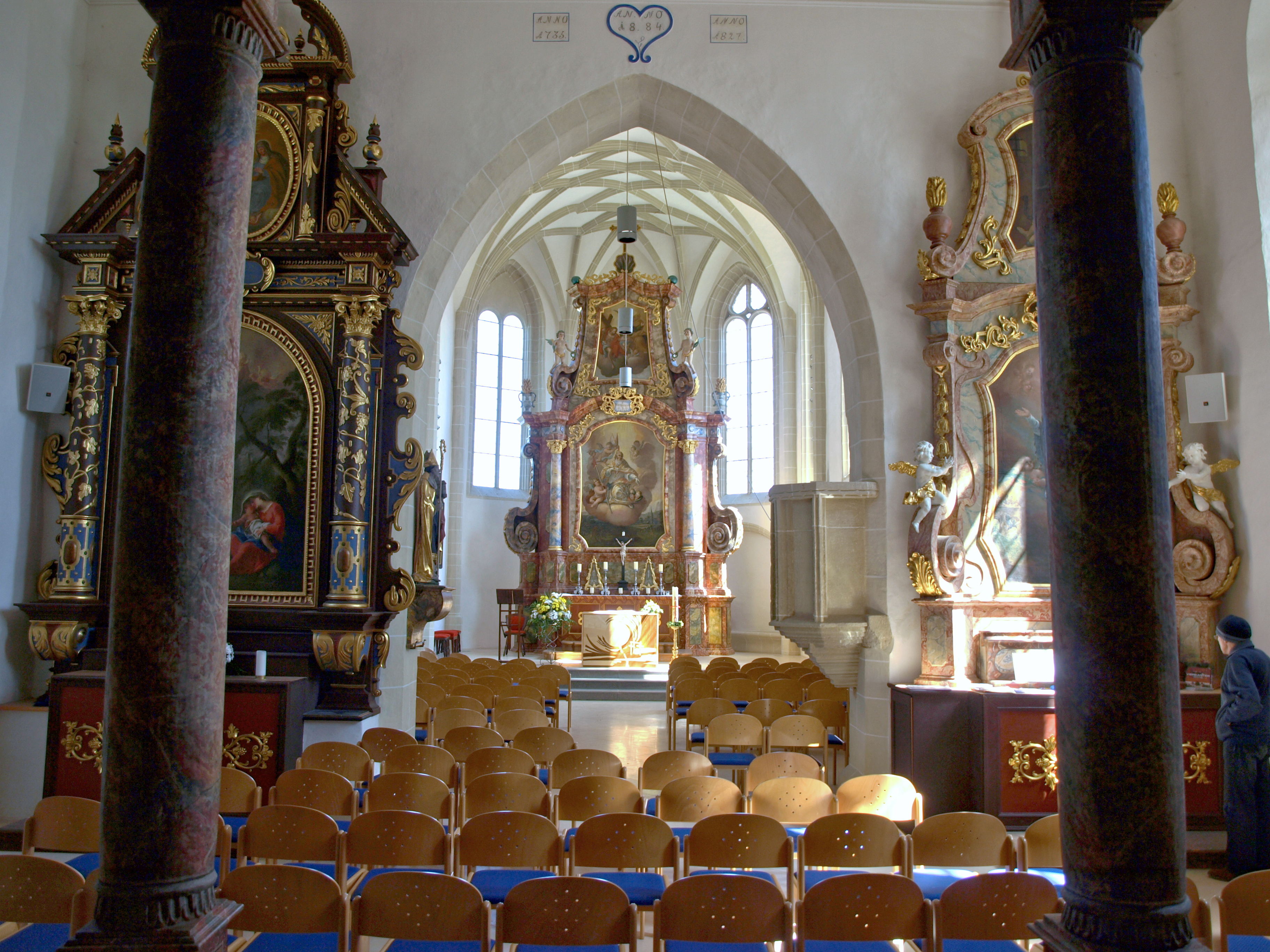 Kath. Filialkirche hl. Wolfgang